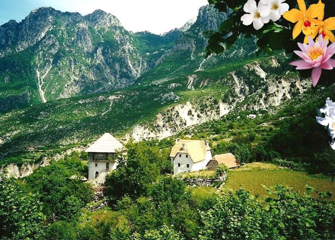 Kullat Piniqi Mëkshaj